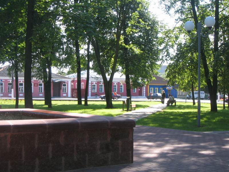 Беларуская (тарашкевіца): Ігумен